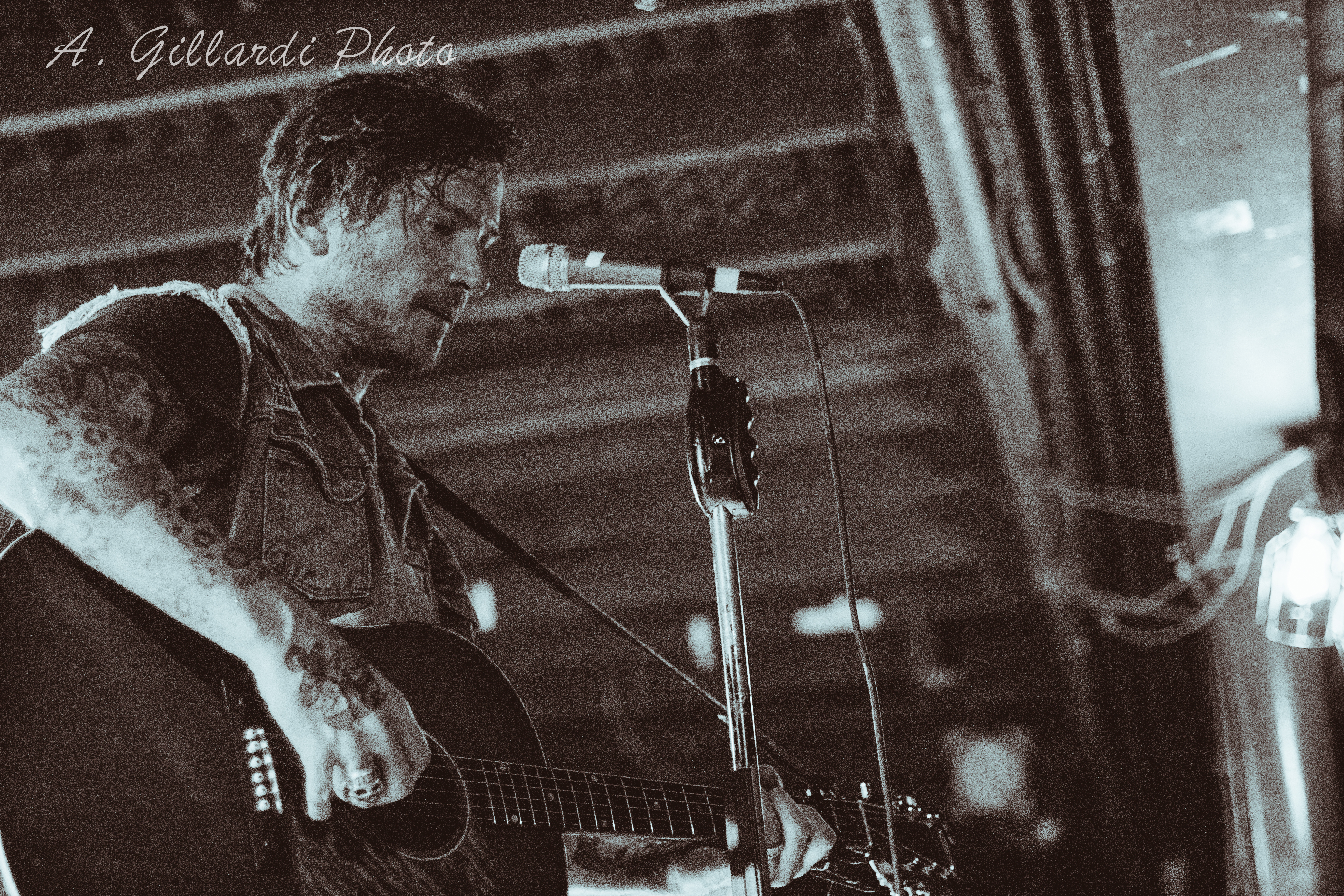 Butch_Walker-4165